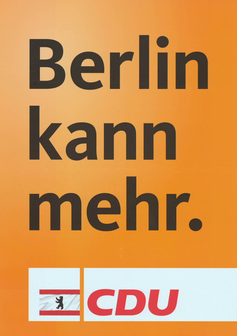 Berlin kann mehr. CDU Abbildung: Berliner Bär Plakatart: Textplakat Allgemein Objekt-Signatur: 10-004 : 1701 Bestand: Plakate zu Abgeordnetenhauswahlen Berlin (10-004) GliederungBestand10-18: Plakate zu Abgeordnetenhauswahlen Berlin (10-004) » CDU Lizenz: KAS/ACDP 10-004 : 1701 CC-BY-SA 3.0 DE